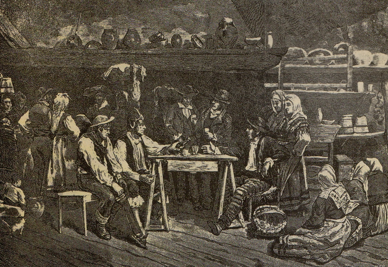 Dibuxu de D. G. Meléndez qu'amuesa un chigre en Ḷḷuarca